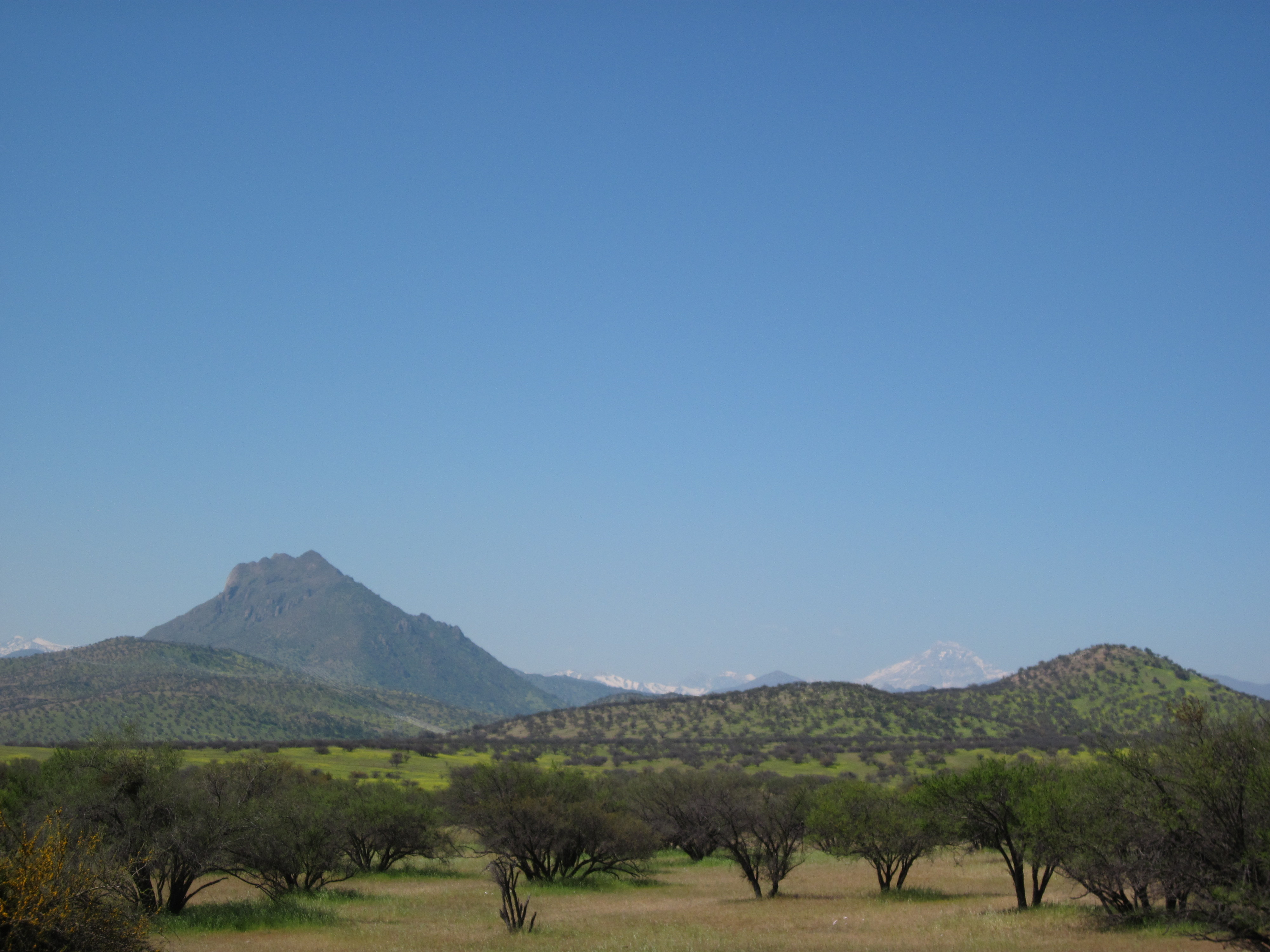 Matorral Chileno unos kilometros al norte de Santiago. Foto tomada en octubre 2012. En el fondo se aprecia el co. Aconcagua.